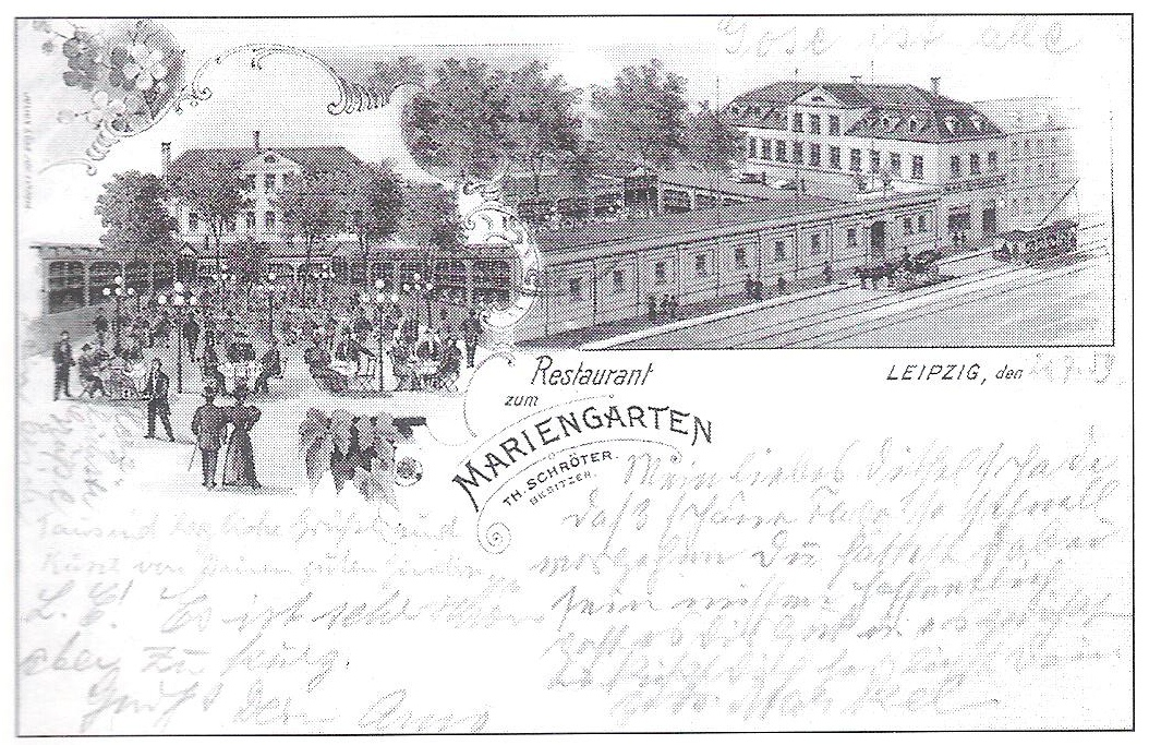 Restaurant "Zum Mariengarten" Leipzig, Postkarte um 1905Gründungsort des Deutschen Fußball-Bunds am 28. Januar 1900